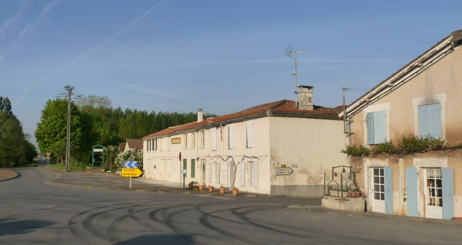 Pont-à-Brac, carrefour routes de Châteauneuf (ancienne route de la Poste) et de Bordeaux, Nonaville, Charente, France